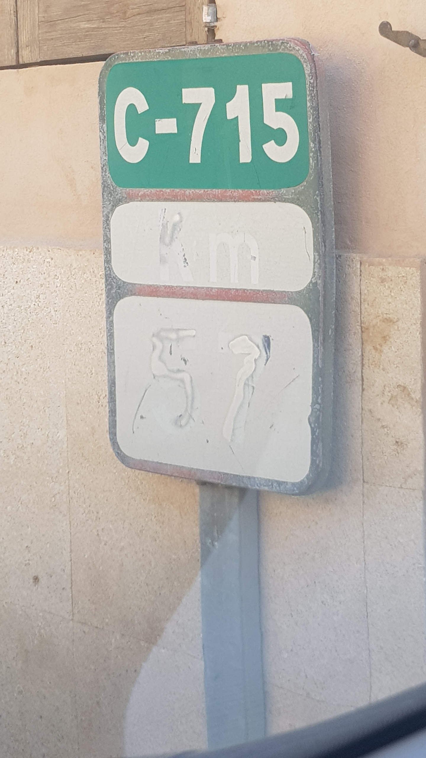 Antic cartell de la carretera C-715 (actual Ma-15) dins el nucli urbà de Sant Llorenç des Cardassar